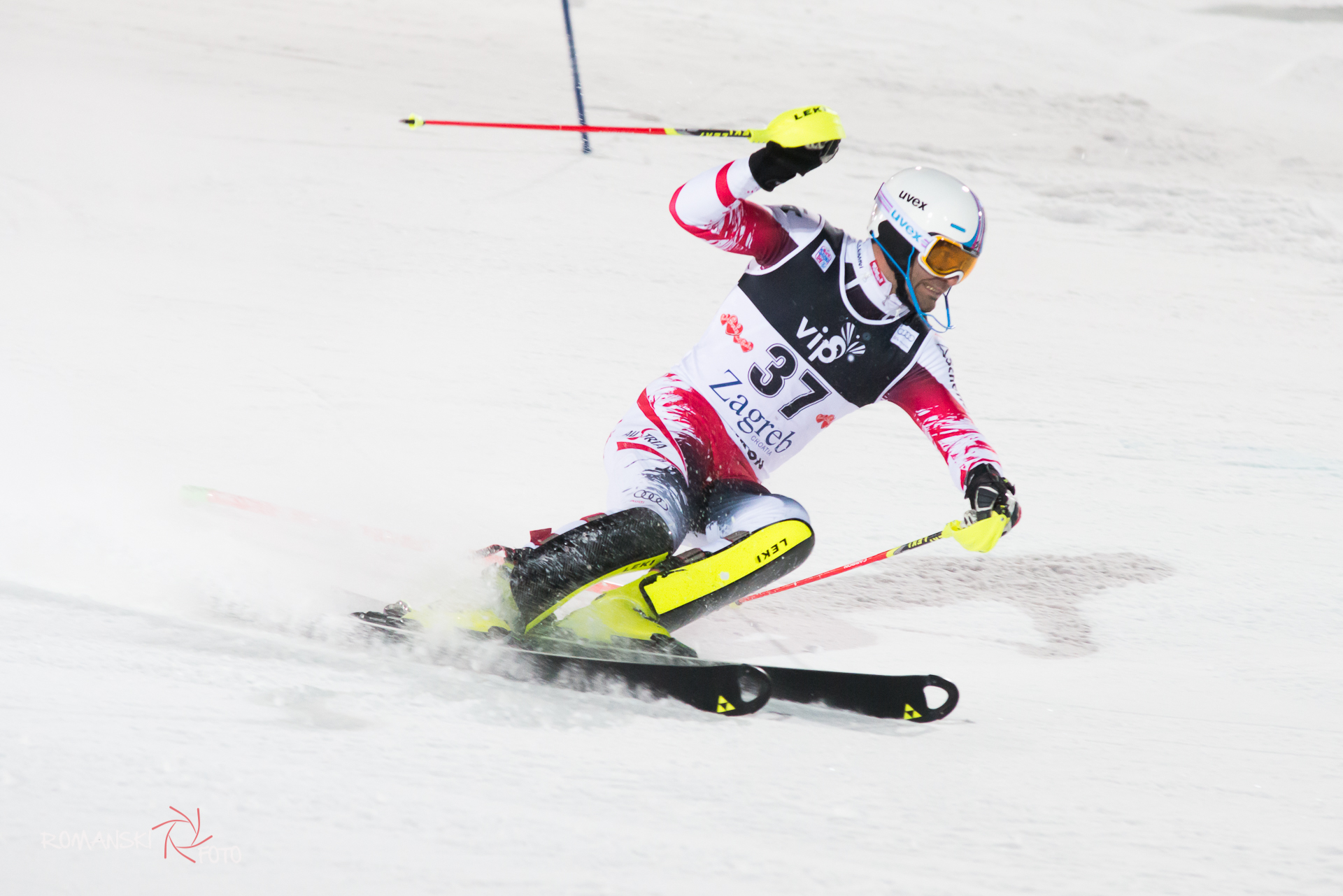 HOERL Wolfgang